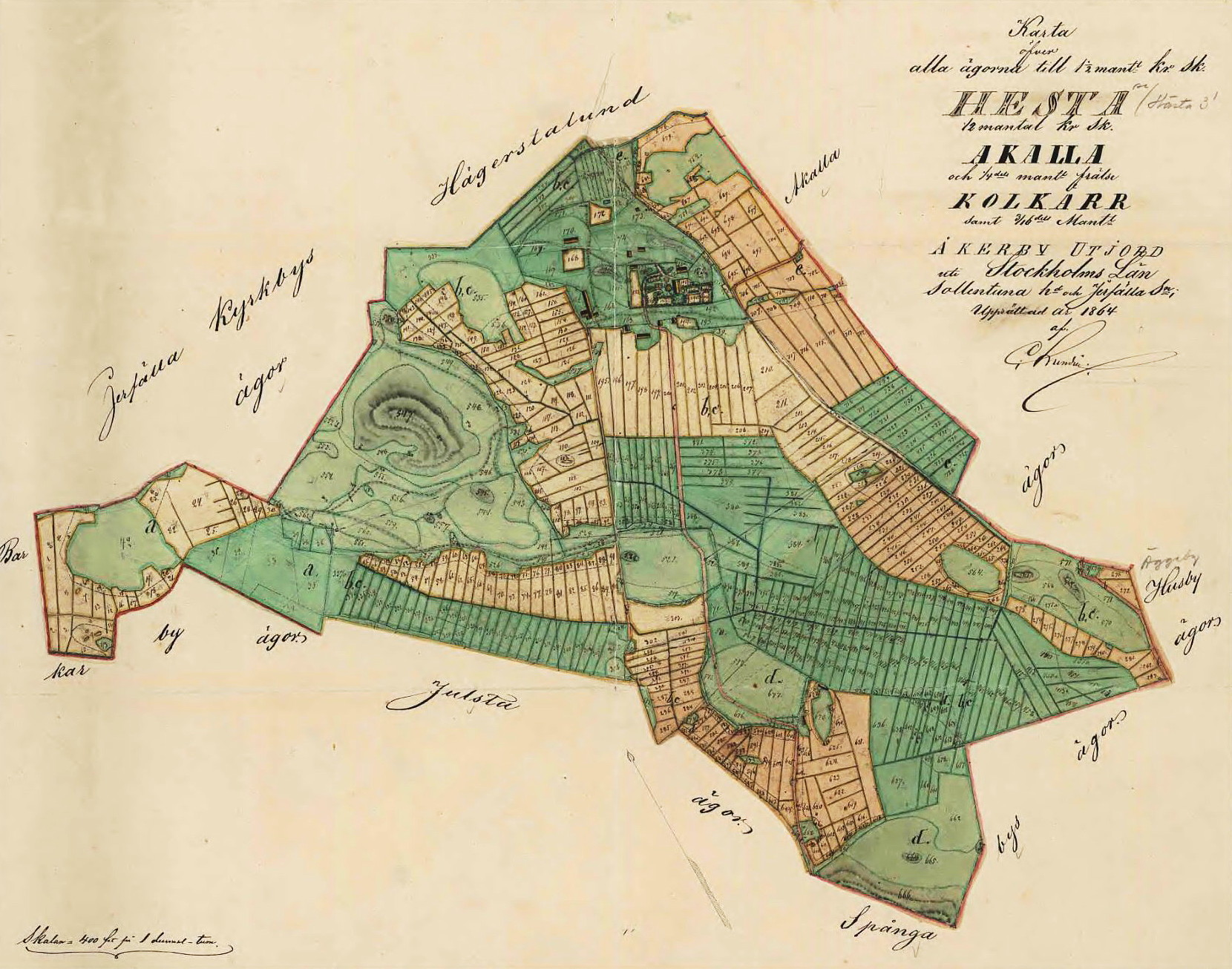 Karta över all ägor till Hesta (Hästa gård)